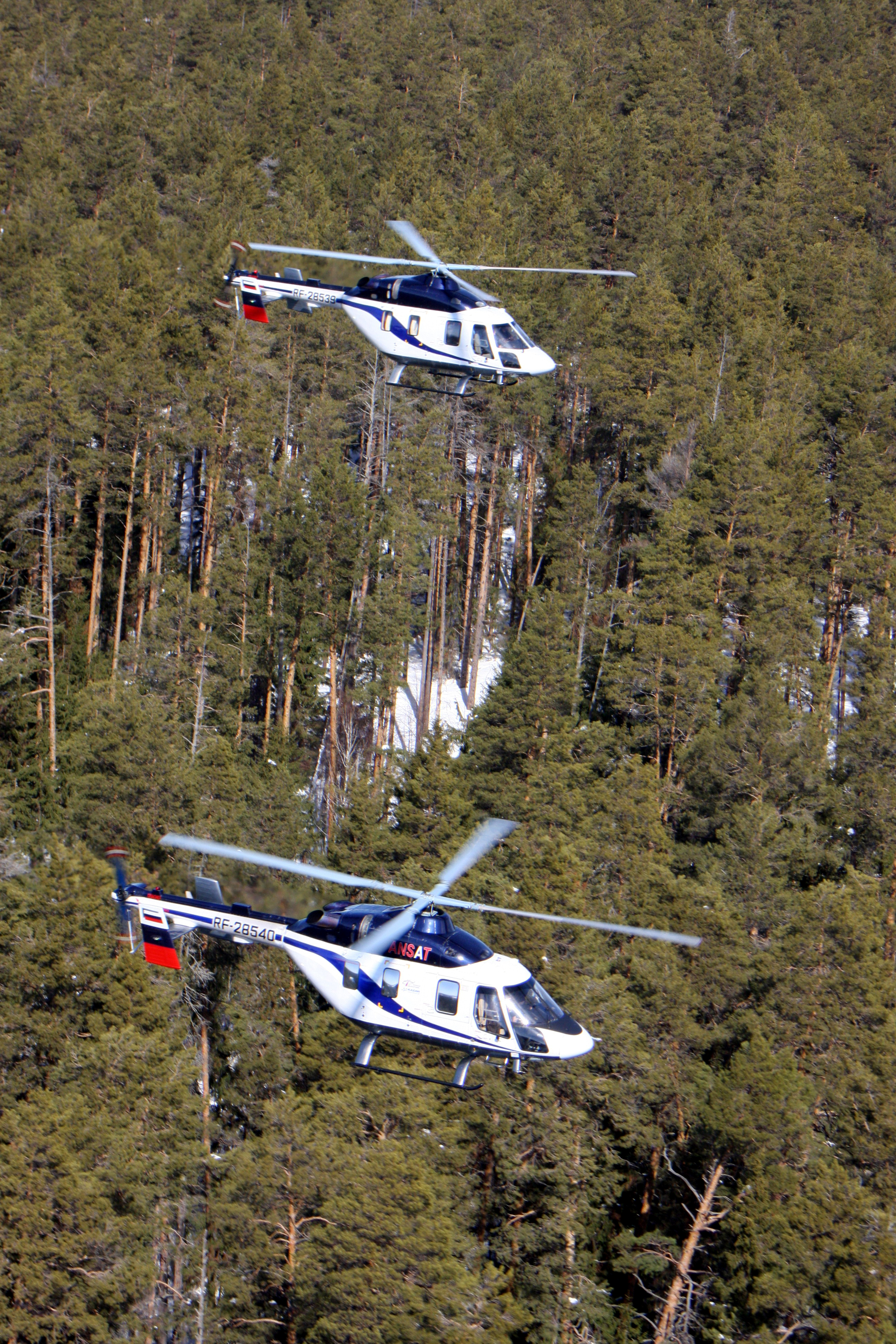 Ансат парой